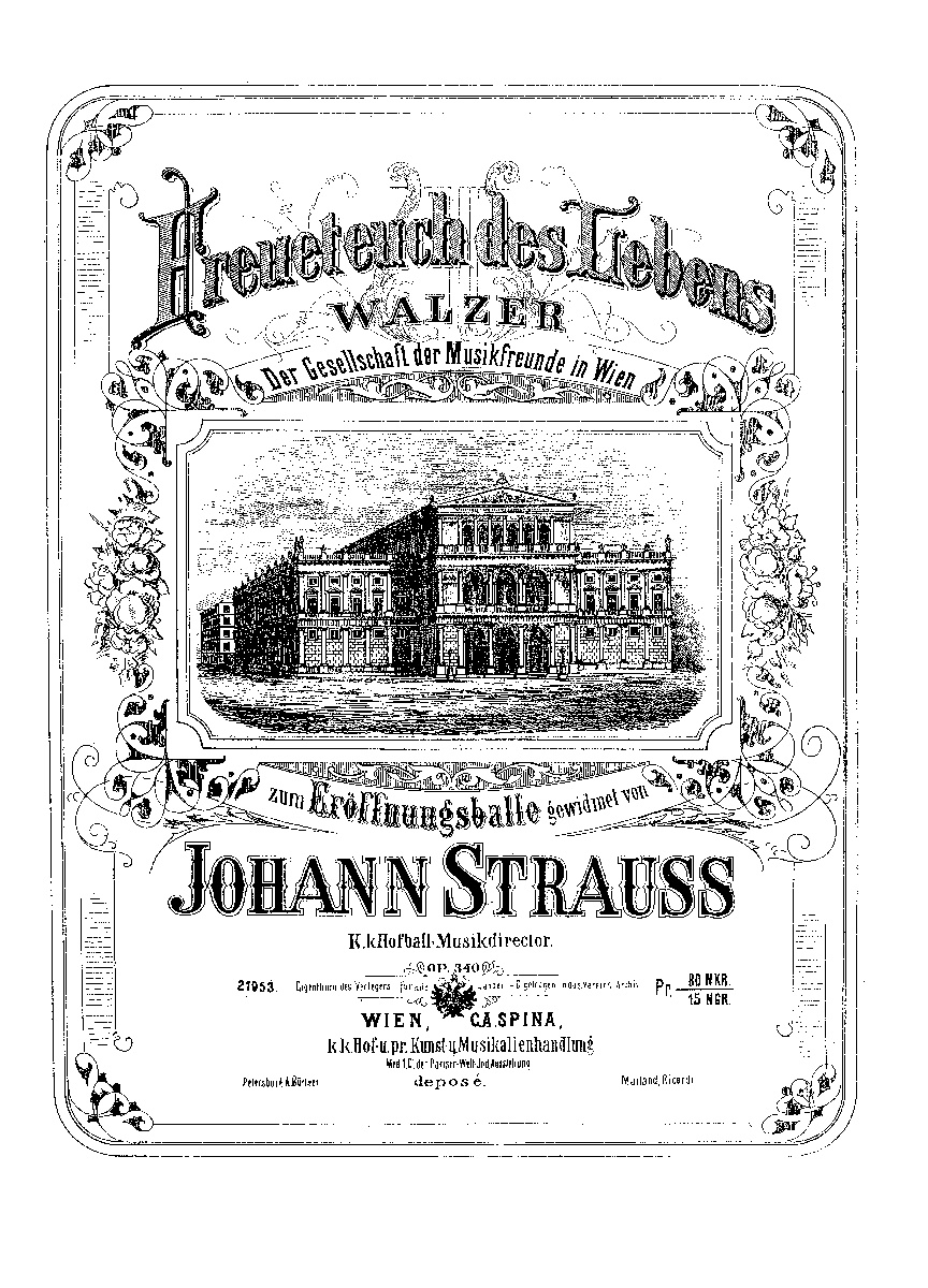 ワルツ『人生を楽しめ』楽譜表紙